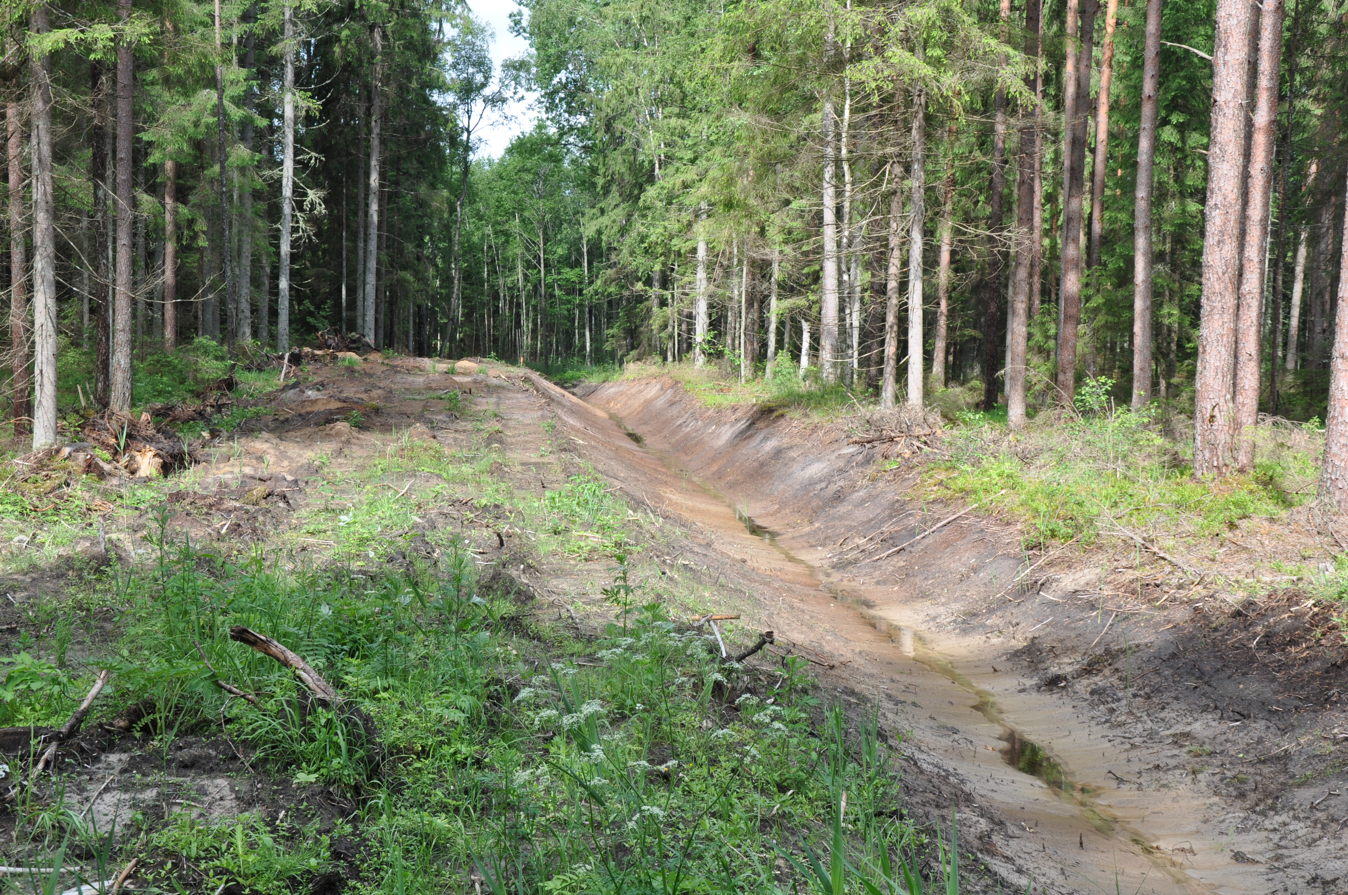 Jaunizrakts meliorācijas grāvis mežā, Suntažu pagasts, Ogres novads, Latvia